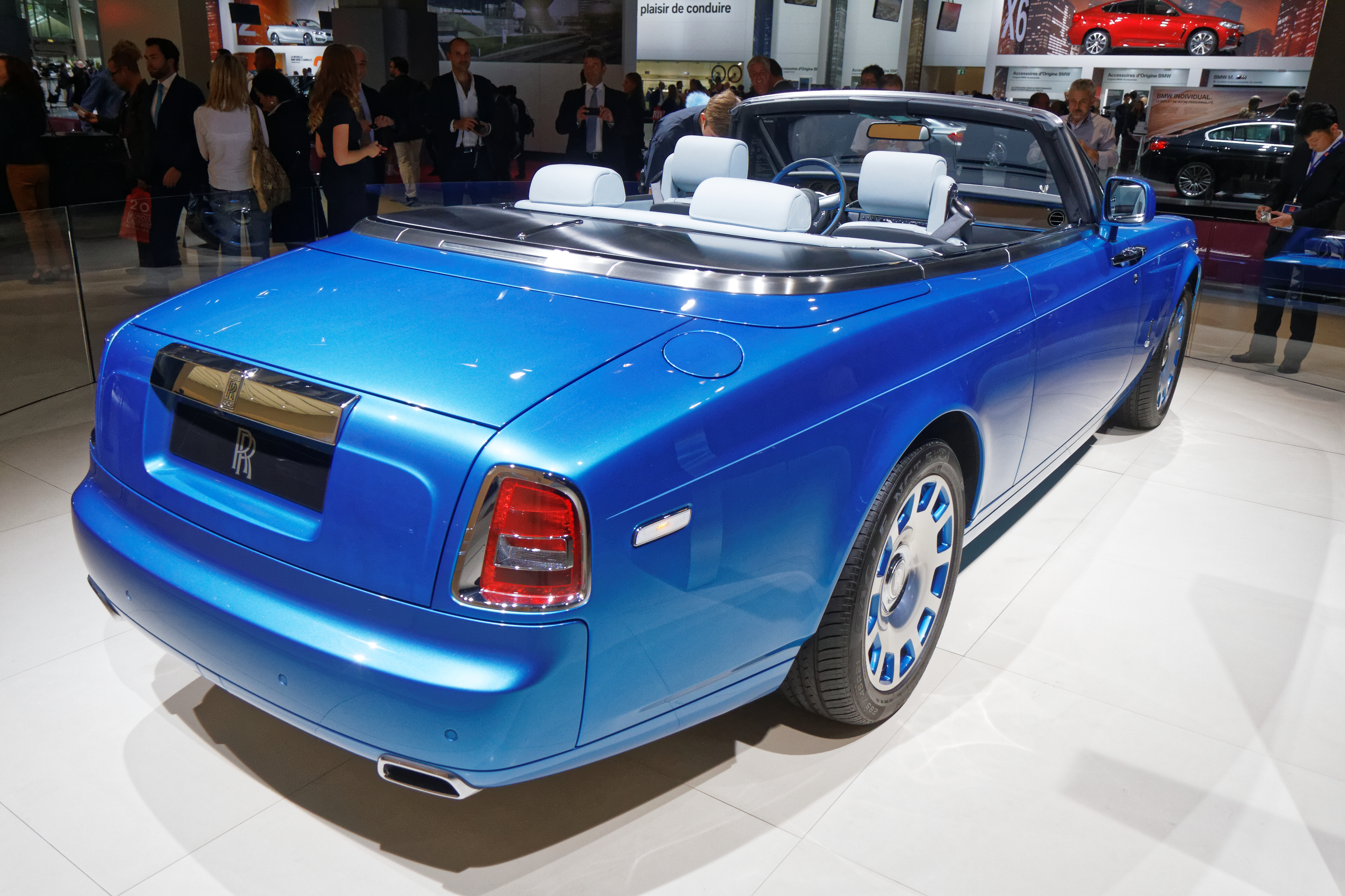 Une Rolls-Royce Phantom Drophead coupé présentée lors du mondial de l'automobile de Paris 2014.